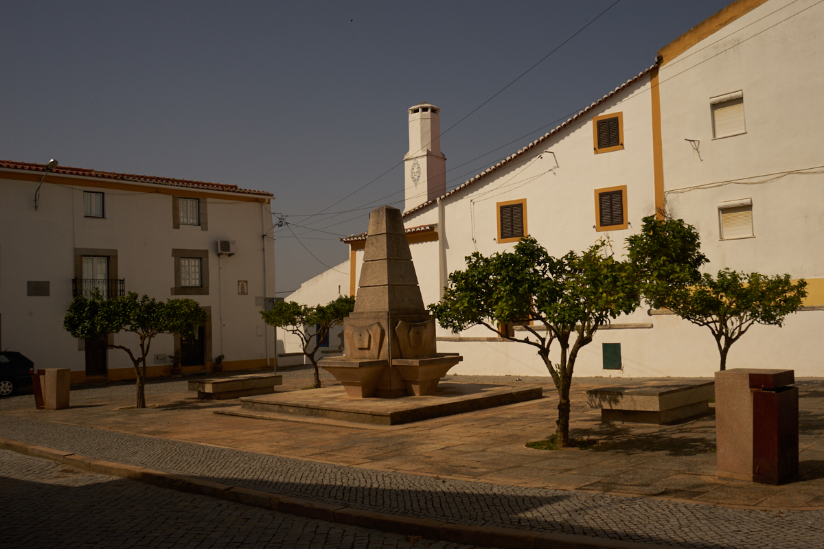 Portugal Sony A7 RAW FILE €29